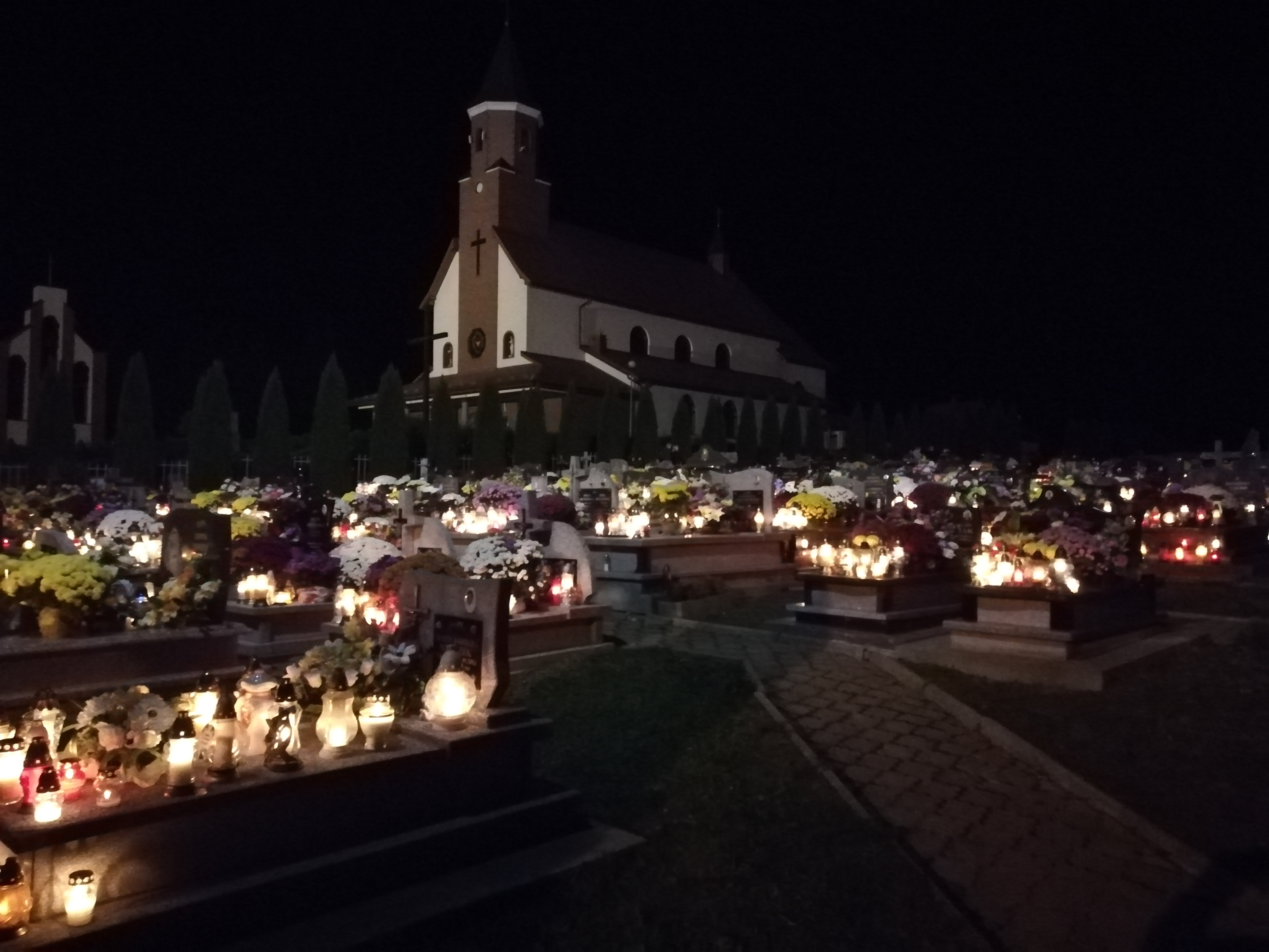 Kościół Podwyższenia Krzyża Świętego w Czaszynie - widok od cmentarza